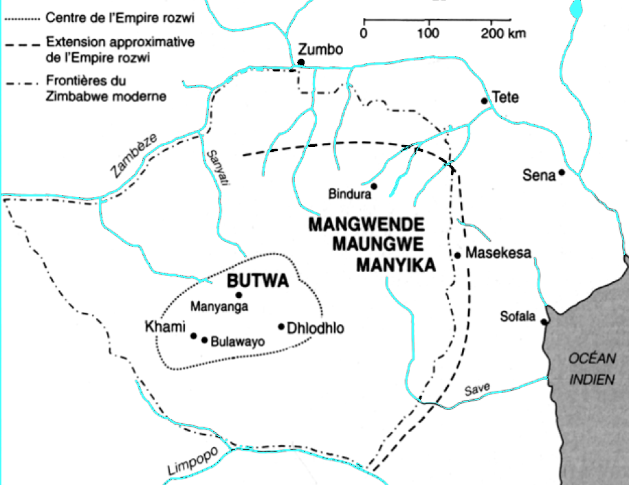 D'après Histoire générale de l'Afrique, vol. 5, p. 715 Carte de l'Empire rozvi